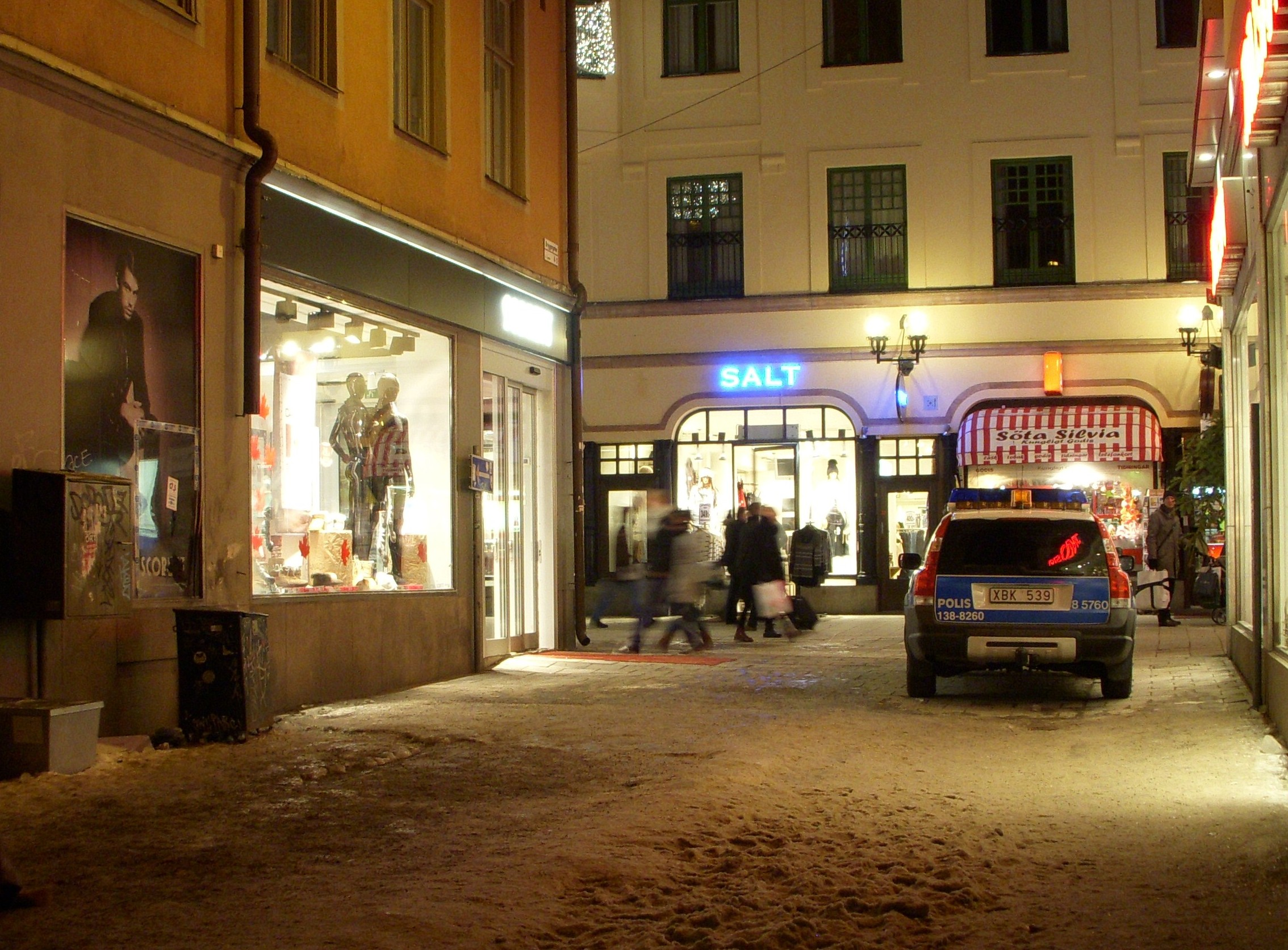 Tatort des Bombenanschlags in Stockholm 2010